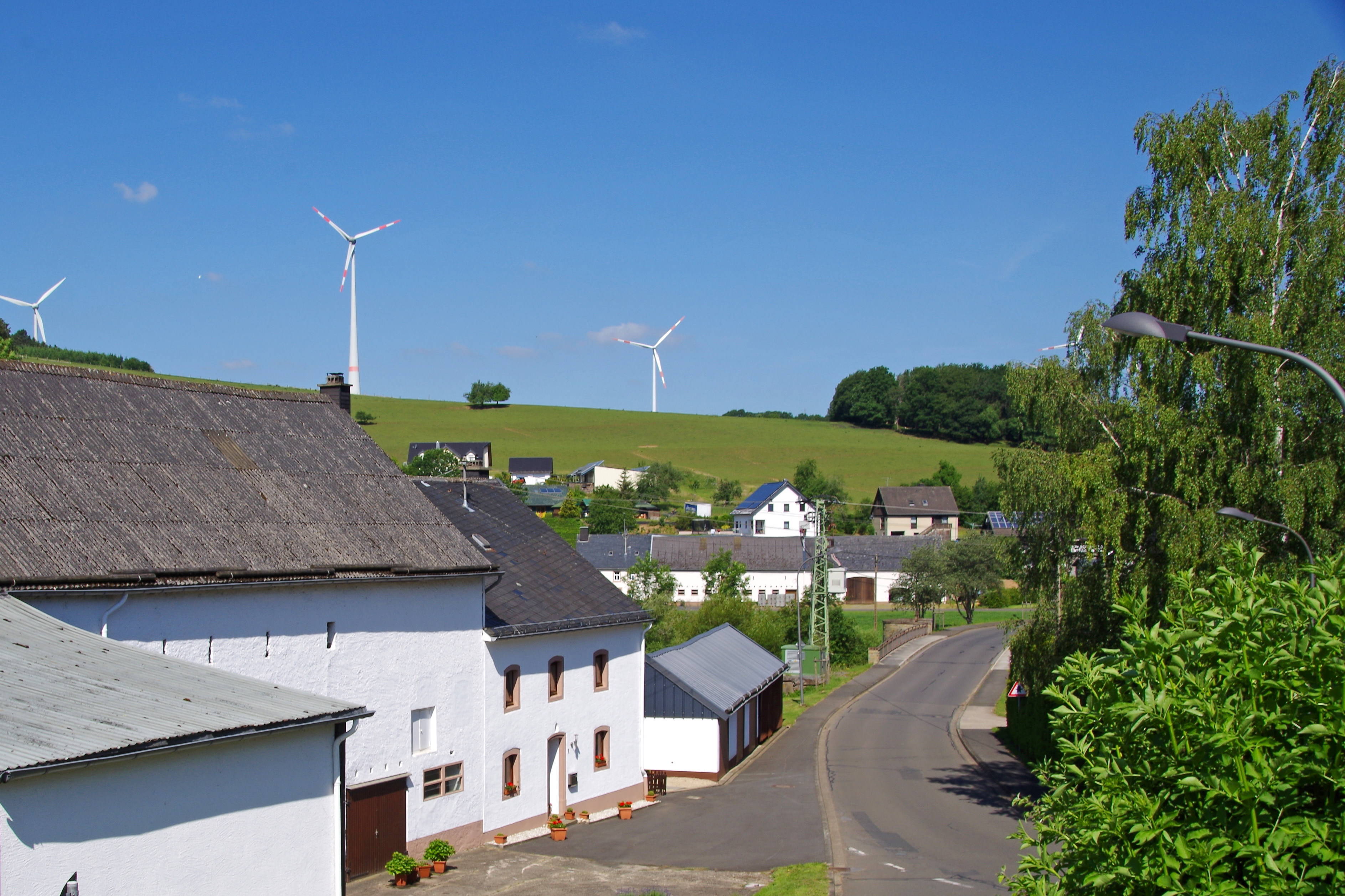 Pittenbach, Dorfstraße, Blick zur Brücke über die Prüm